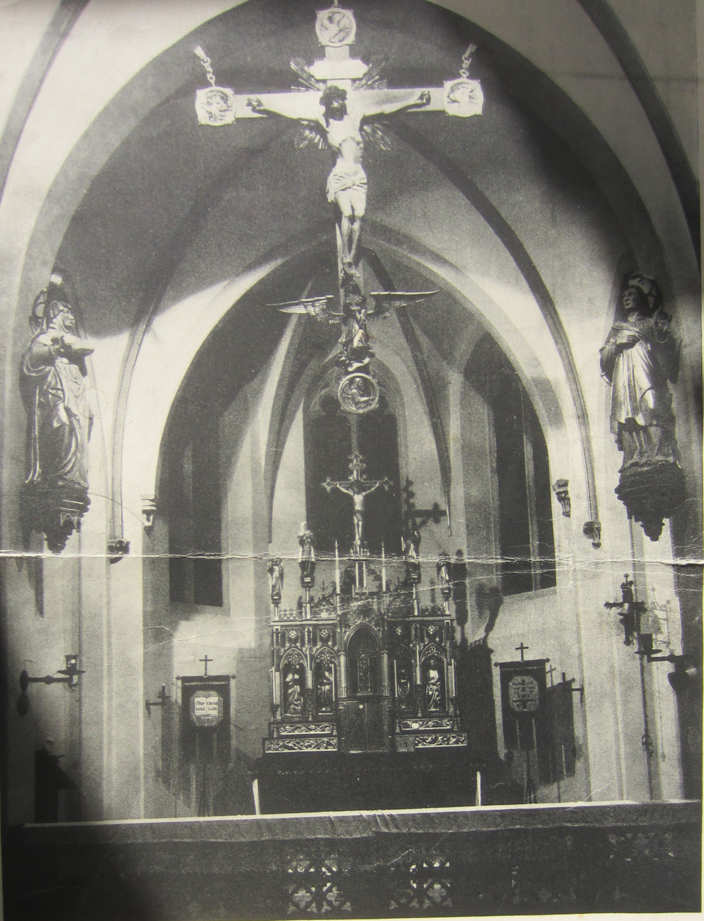 Innenansicht der Pfarrkirche in den 50er Jahren